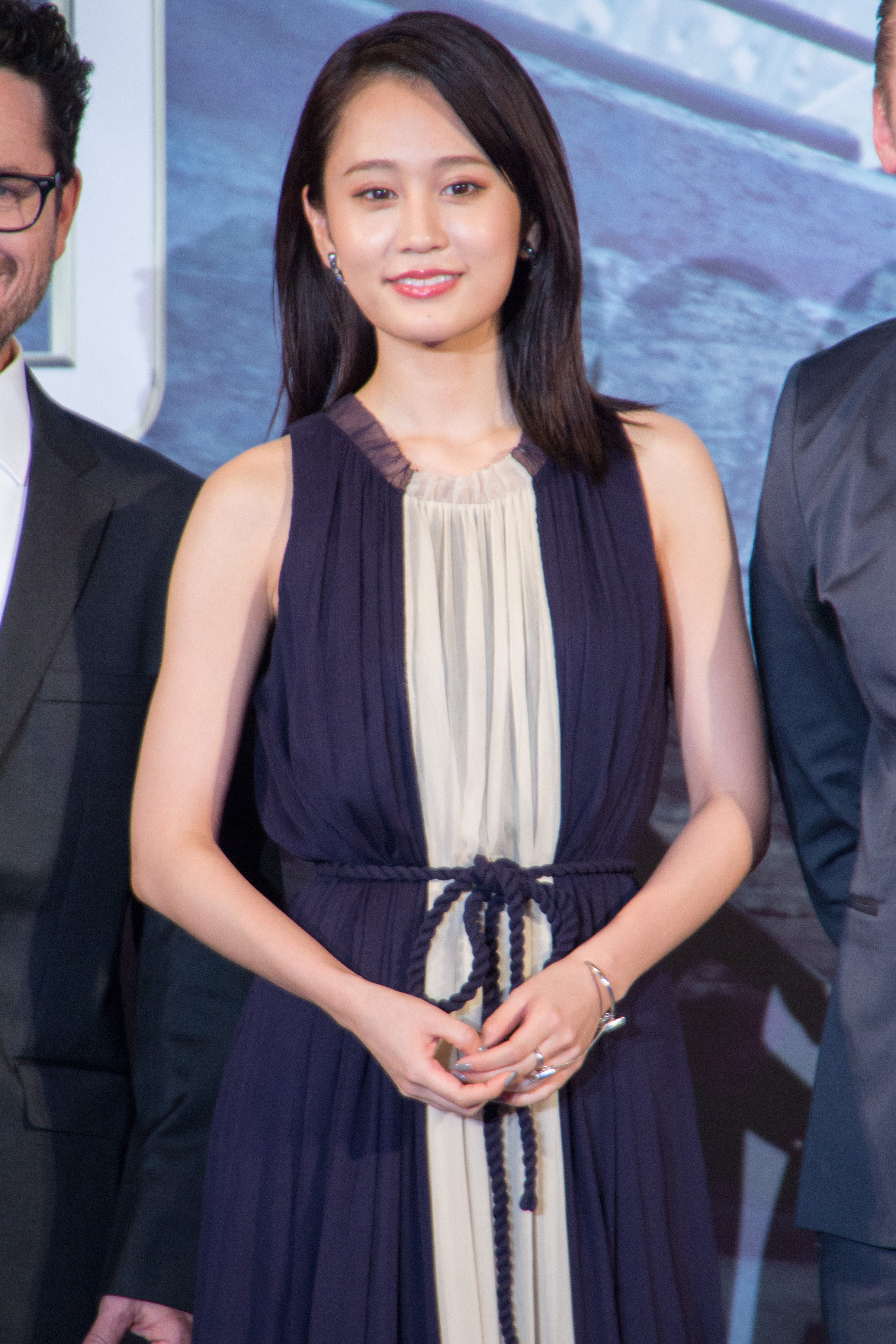 スター・トレック BEYOND ジャパン・プレミア レッドカーペット 前田敦子